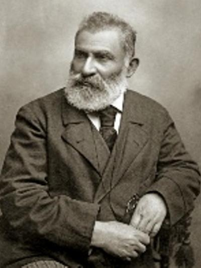 Perch Proshyan